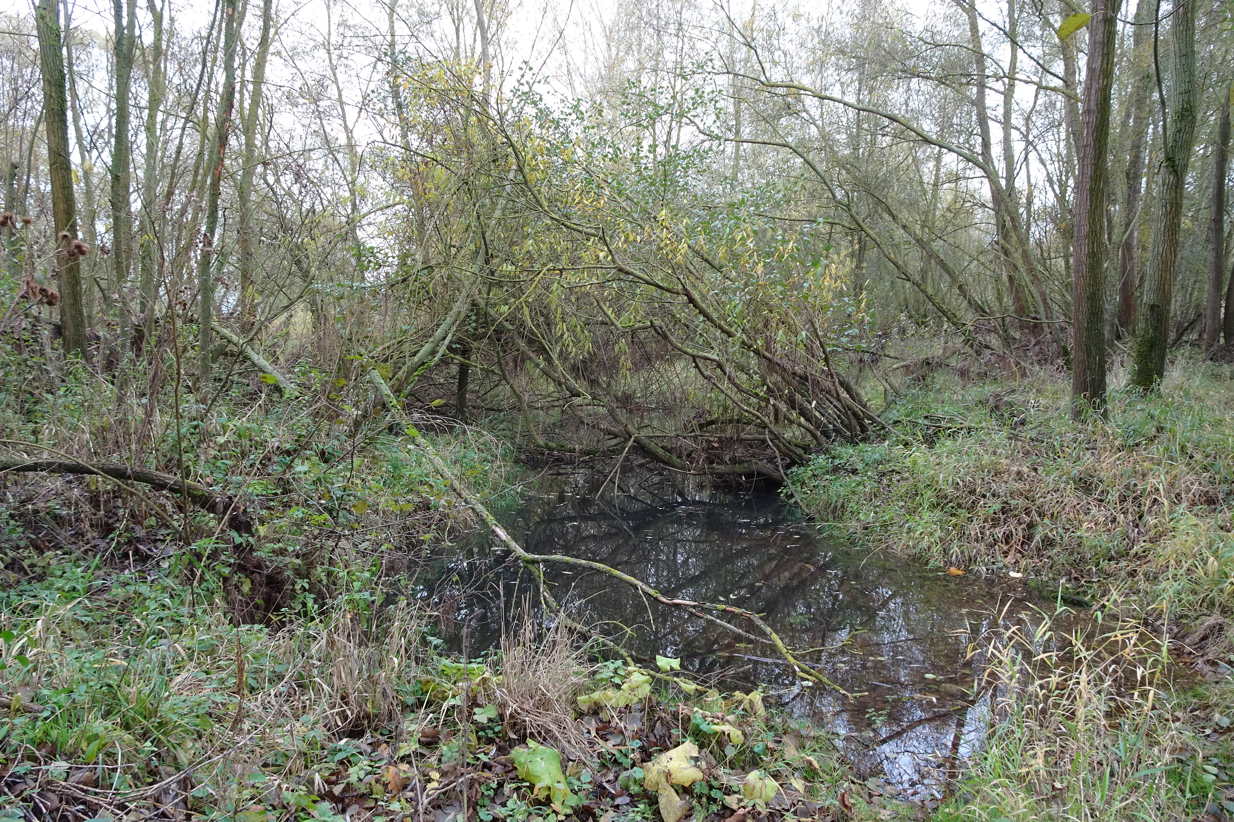 Die Kiesgrube bei Baumbach ist eine ehemalige Kiesabbaufläche in der Flussaue der Fulda im hessischen Landkreis Hersfeld-Rotenburg. Noch während der laufenden Auskiesung erfolgten Renaturierungs- und Gestaltungsmaßnahmen, mit dem Ziel, die Uferareale so zu gestalten, dass vielfältige Biotope entstehen können. Um diesen Bereich, der Vögeln Brutstätten, Trittsteine und Nahrungshabitate bietet, dauerhaft zu schützen, wurde das Gewässer mit seinen Ufern als Naturschutzgebiet ausgewiesen.